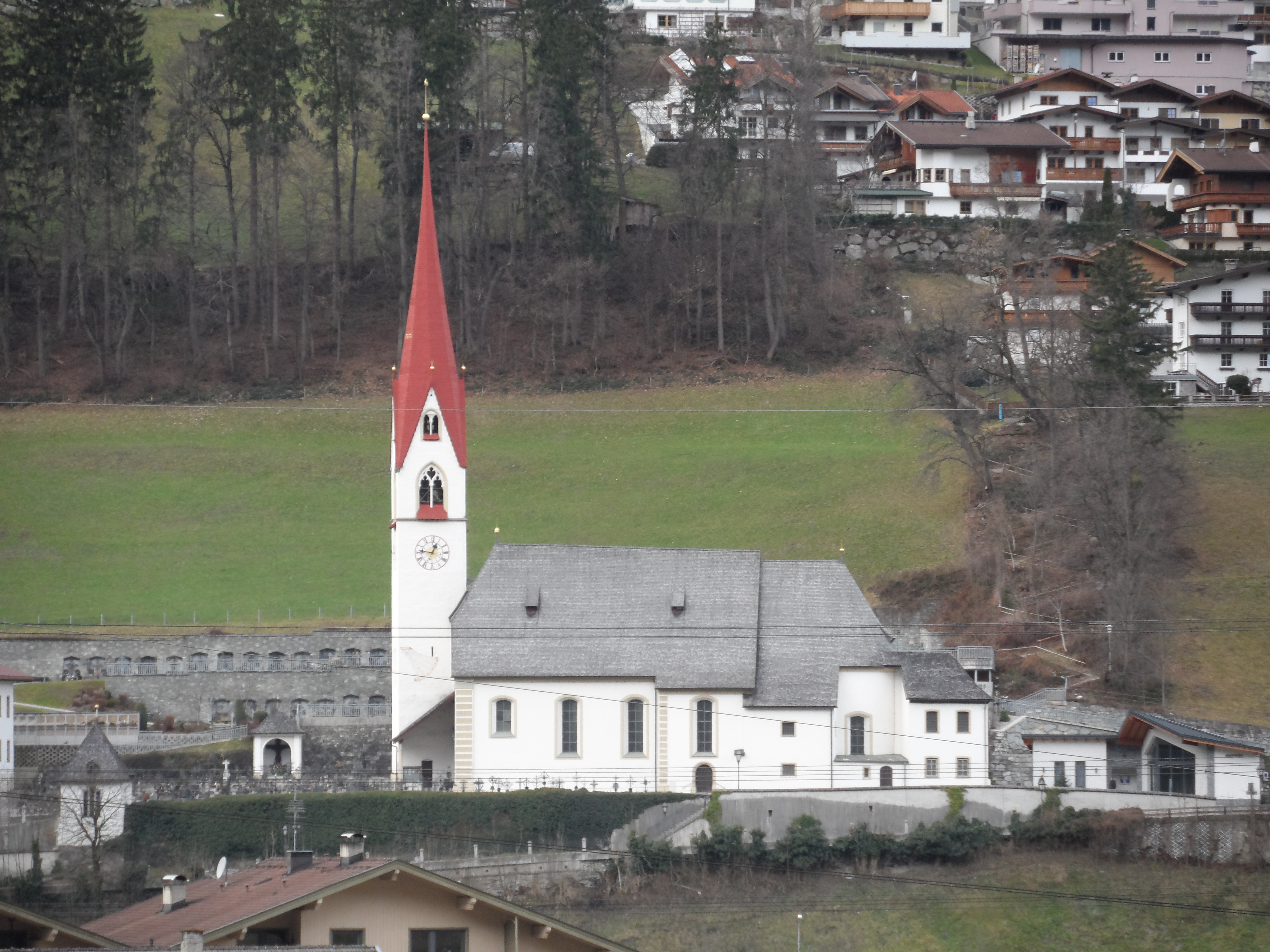 Kath. Pfarrkirche Hll. Ingenuin und Albuin - Hippach